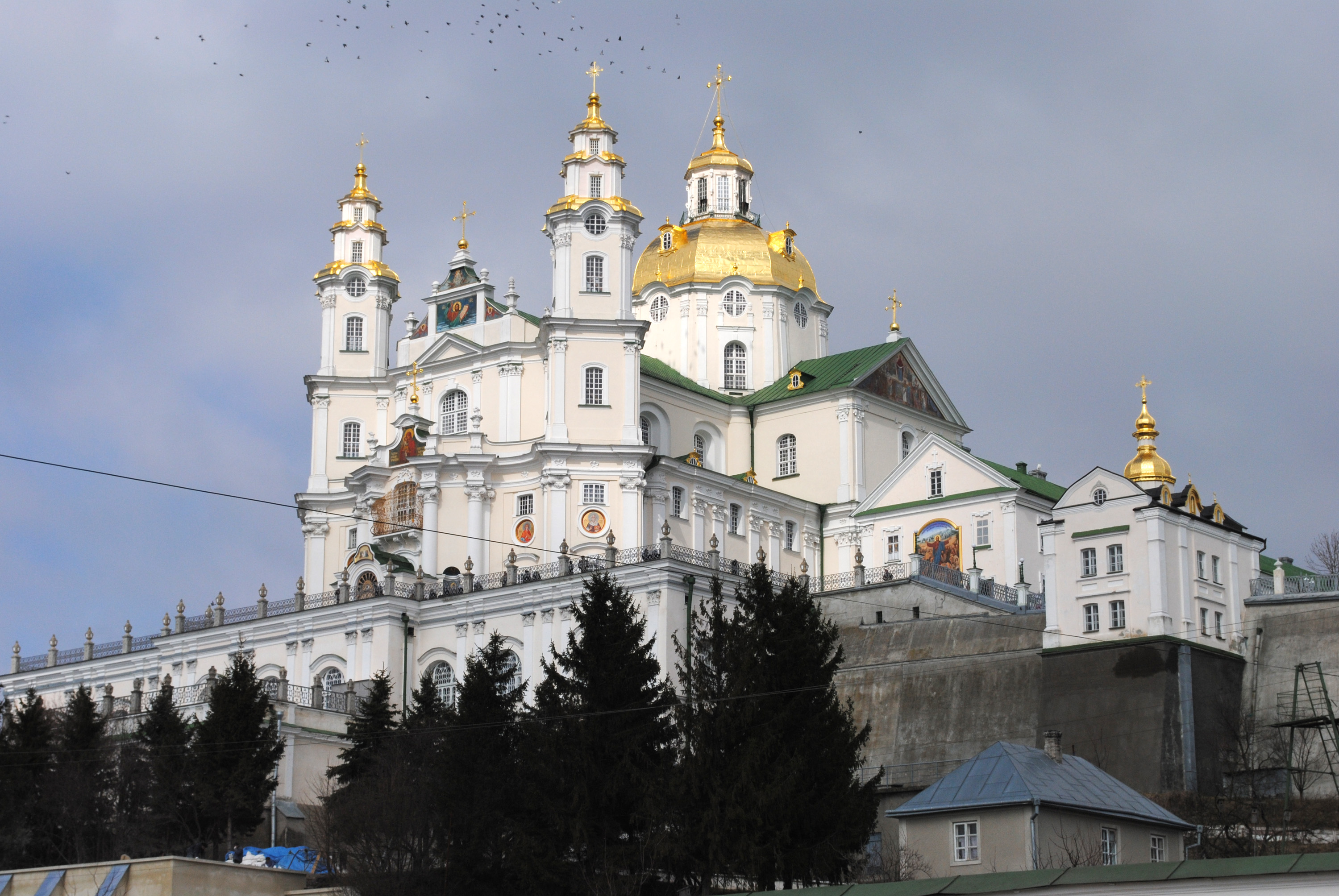 Успенський собор Почаївської лаври, м. Почаїв Кременецького району Тернопільської області.